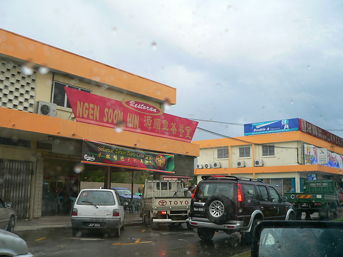 Deretan kedai jualan di pekan Inanam